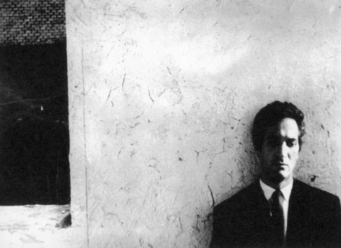 Foto de "El Romance del Aniceto y la Francisca", de Leonardo Favio. Argentina. En la foto Federico Luppi